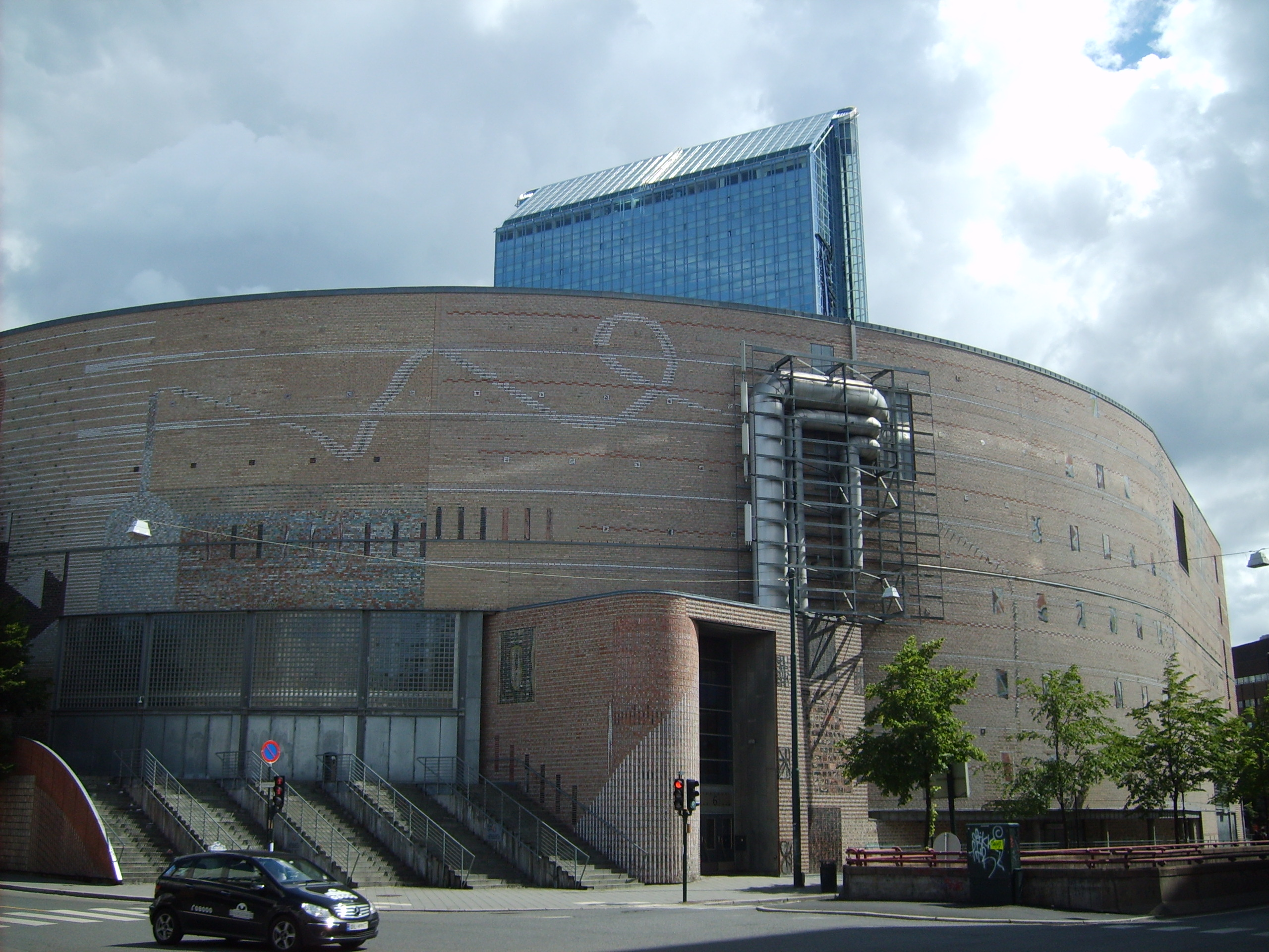 Norsk (bokmål): Oslo Spektrum på Vaterland i Oslo